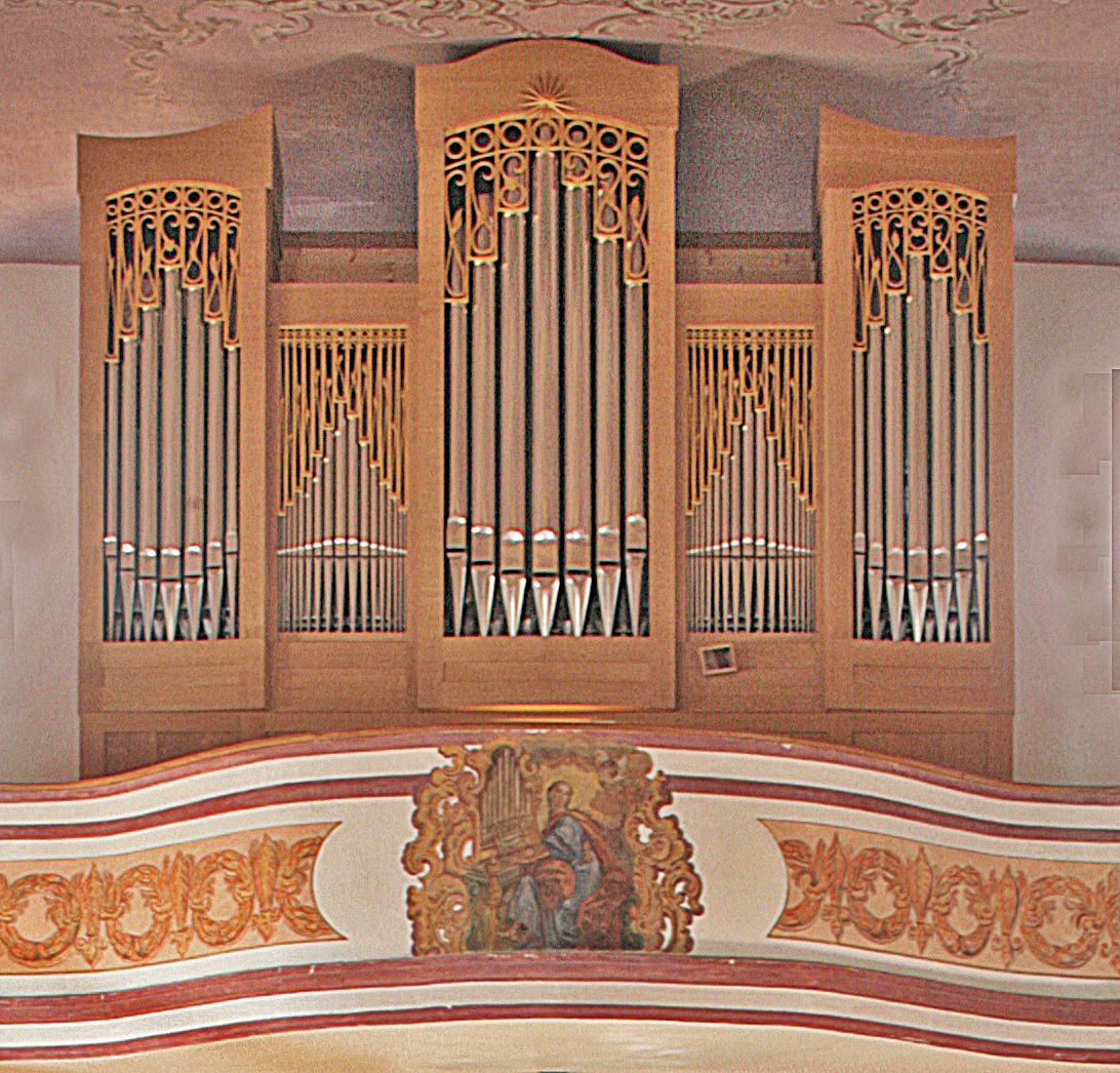 St. Michael Mering, Landkreis Aichach-Friedberg, Bayern, Deutschland